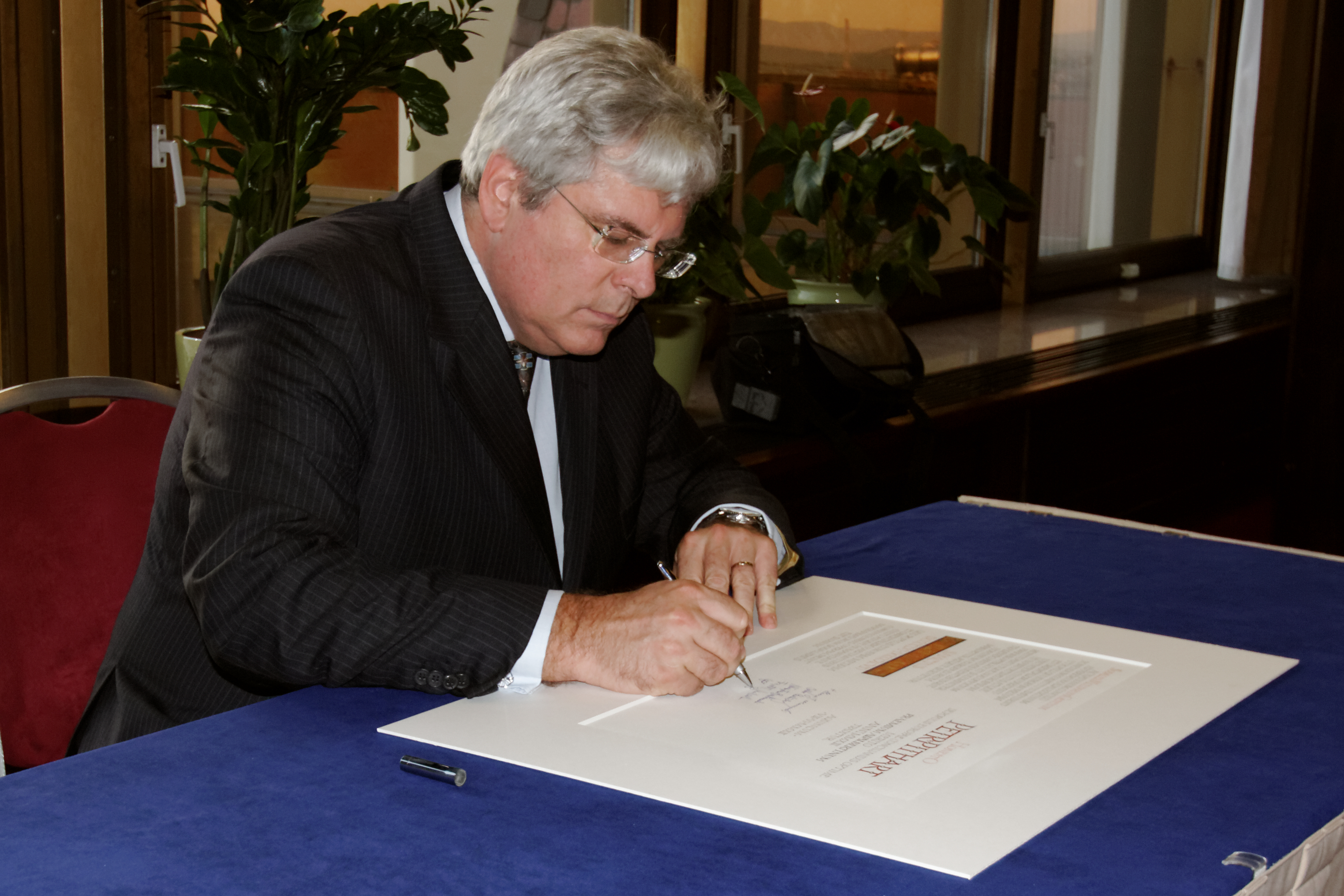 Igor Slobodnik, Botschafter der Slowakischen Republik in Deutschland